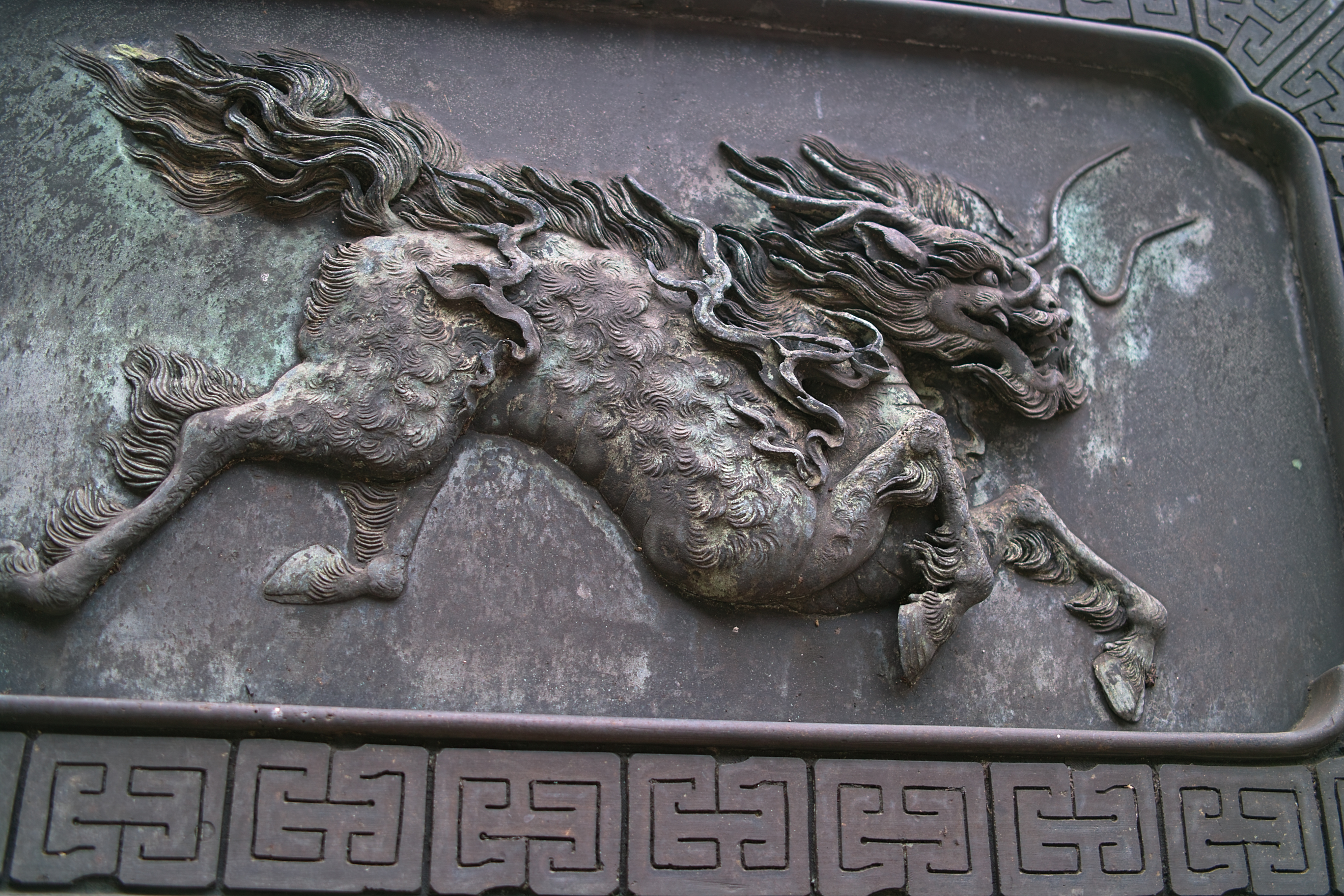 靖国神社 麒麟